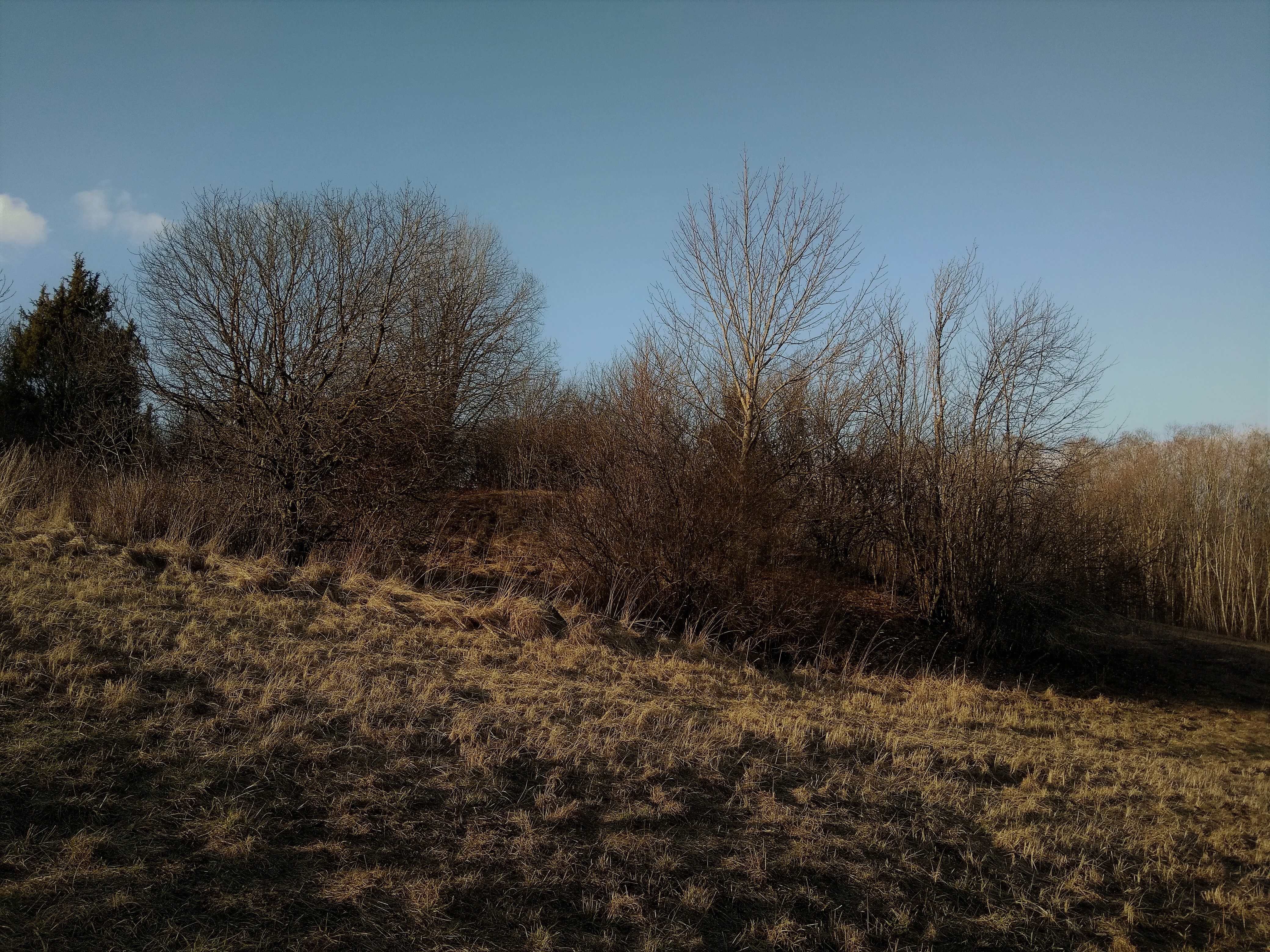 Vaade lõunakagust linnuse maa-ala kaguküljel oletatavalt asetsenud väravakohale.